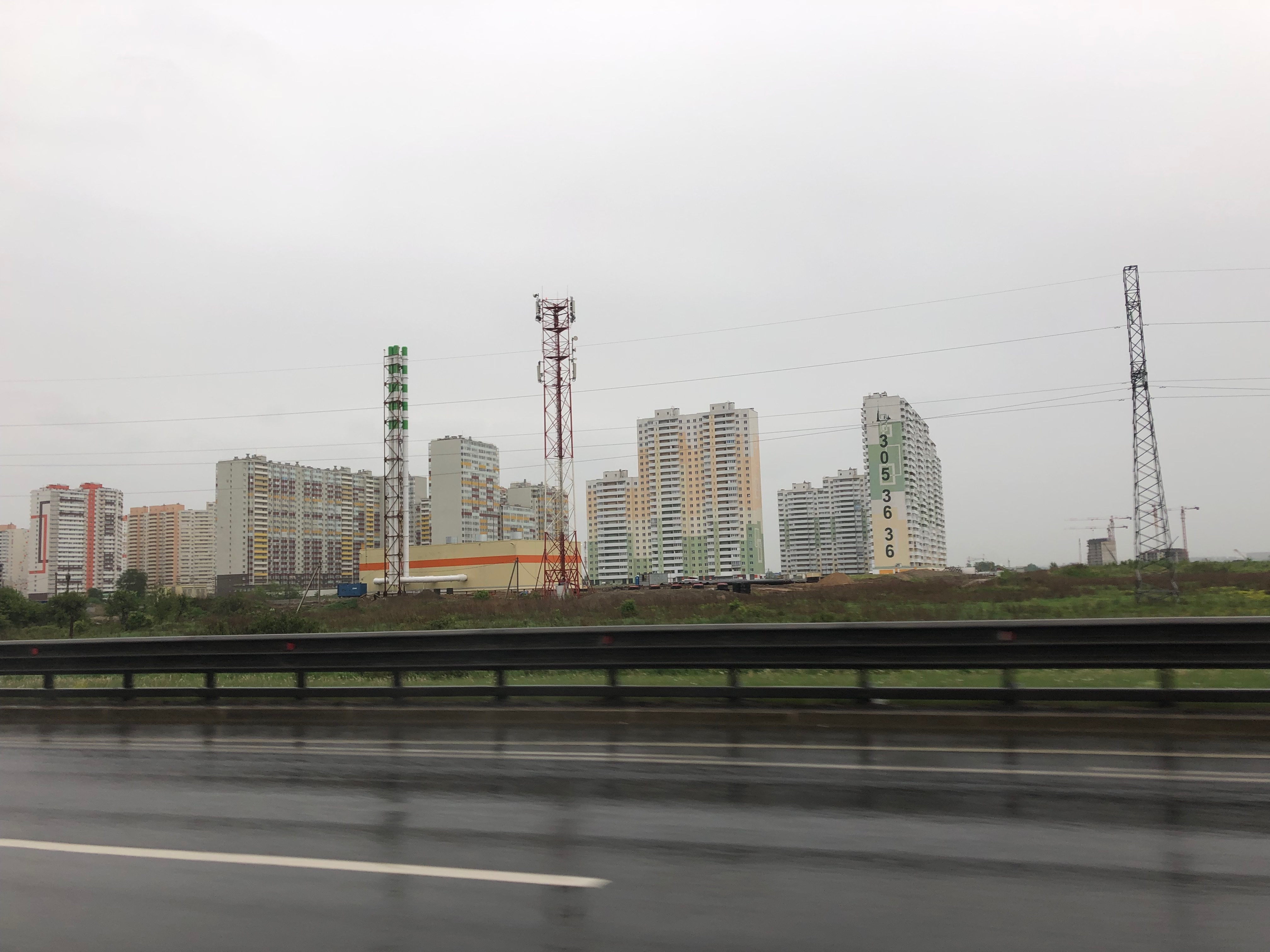 Шушары